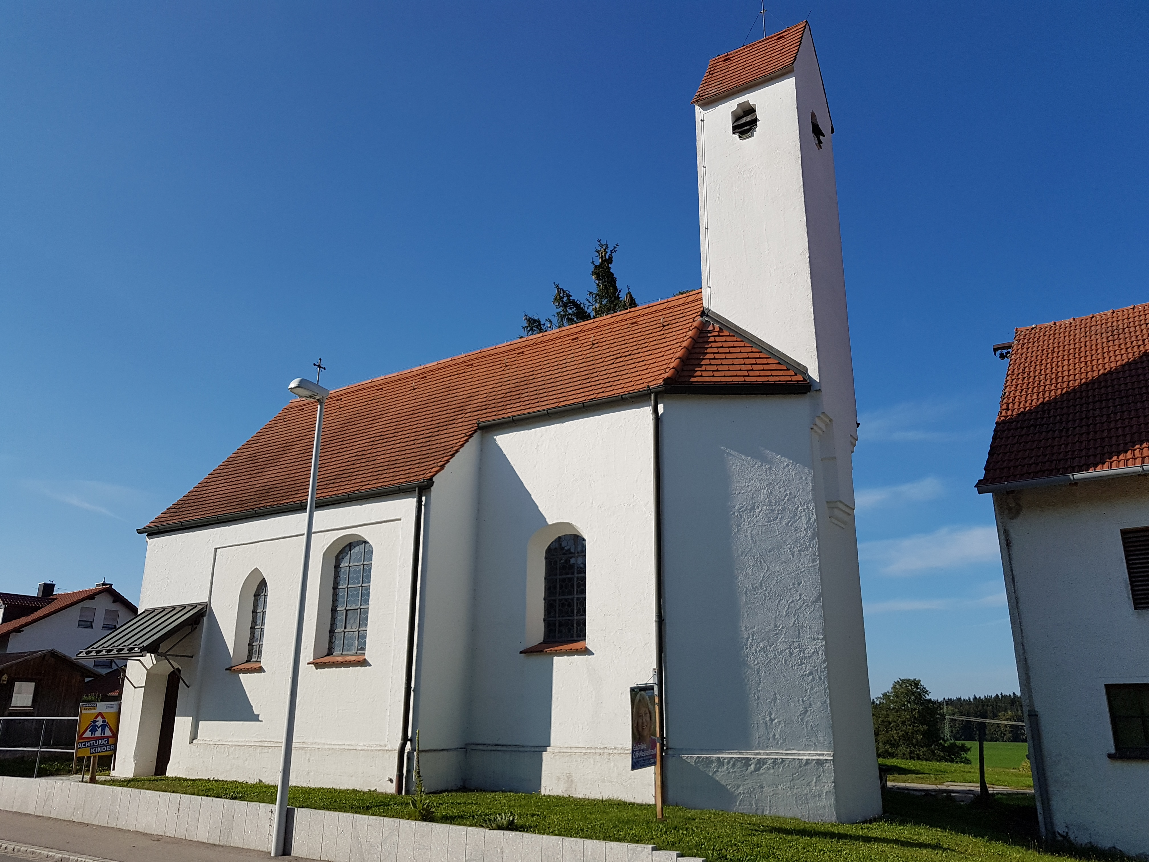 Waltenhofen (Egenhofen), Katholische Filialkirche Heilige Dreifaltigkeit; die reiche hochbarocke exzellente Ausstattung ist seit 6 Jahren durch Baugerüste verstellt.